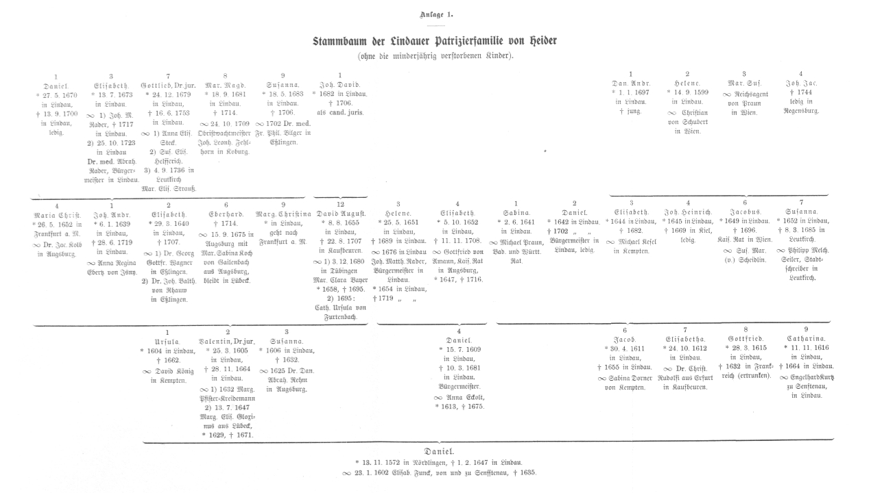 Stammbaum des Patrizier- und Adelsgeschlechts Heider, zu der Reichsstadt Lindau (von Heider von und zu Gitzenweiler).